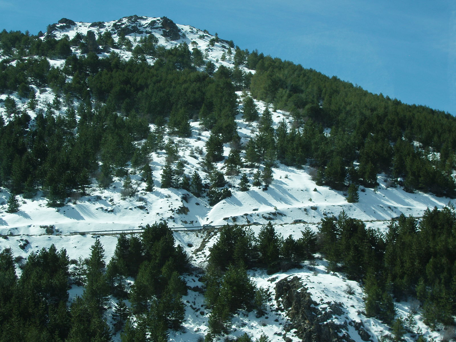 Sierra Nevada España (Spain). Bosque de Pinus sylvestris var. nevadensis.